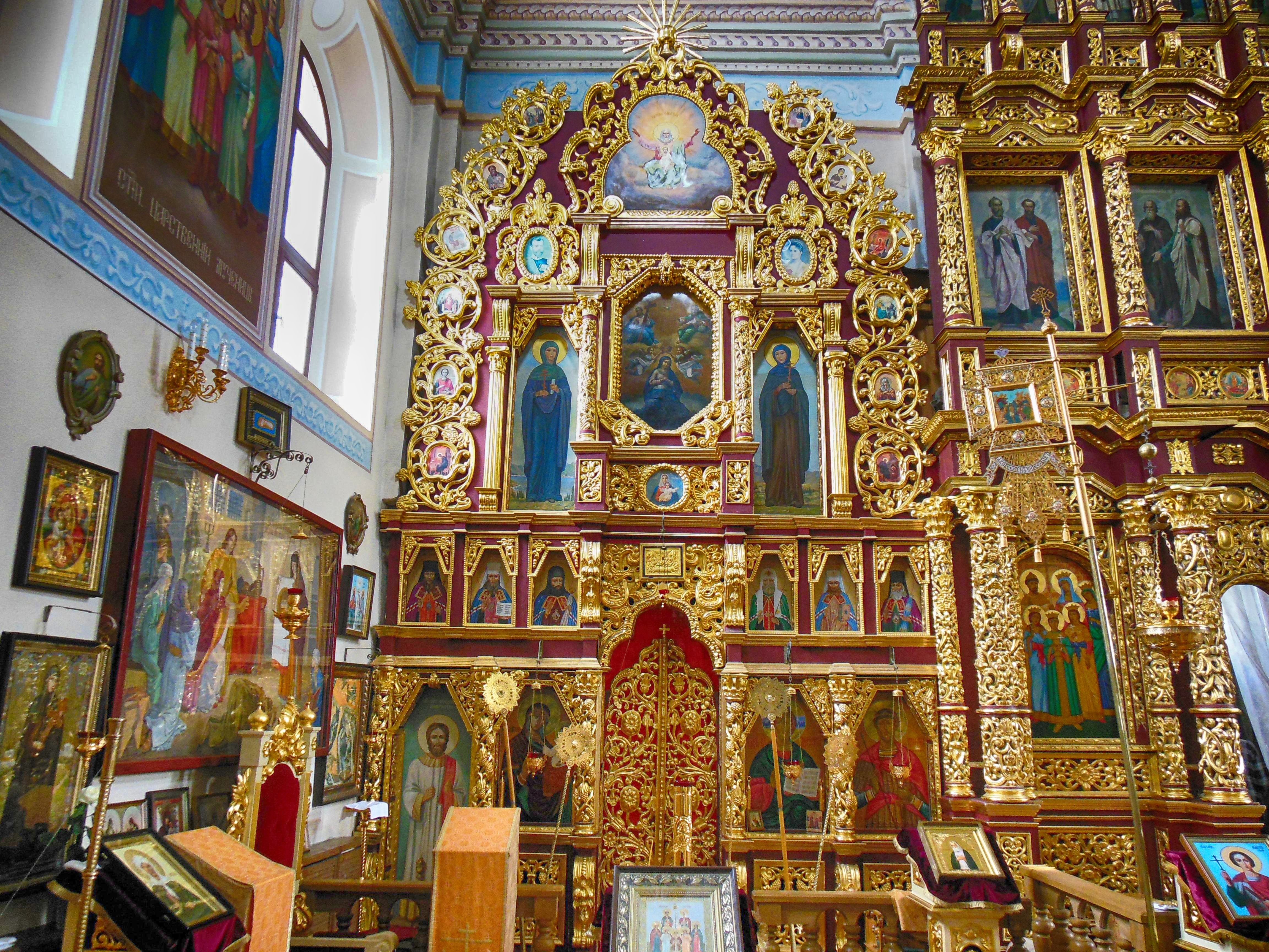 Беларуская (тарашкевіца): Комплекс Мікольскага манастыра ў межах агароджы:званіцажылы дом (шпіталь) Мікольская царквадэкаратыўнае аздабленьне царквы: фрэскі сюжэтныя, фрэскі арнаментальныя, іканастас, арнаментальная ляпнінаАнуфрыеўская царкваагароджа з уязной брамай. г. Магілёў This is a photo of Belarusian heritage monument. Reference number: 511Г000017 ( WLM)